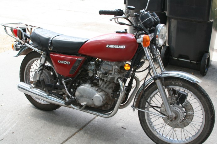 Vintage kawasaki Kawasaki KZ400 Twin